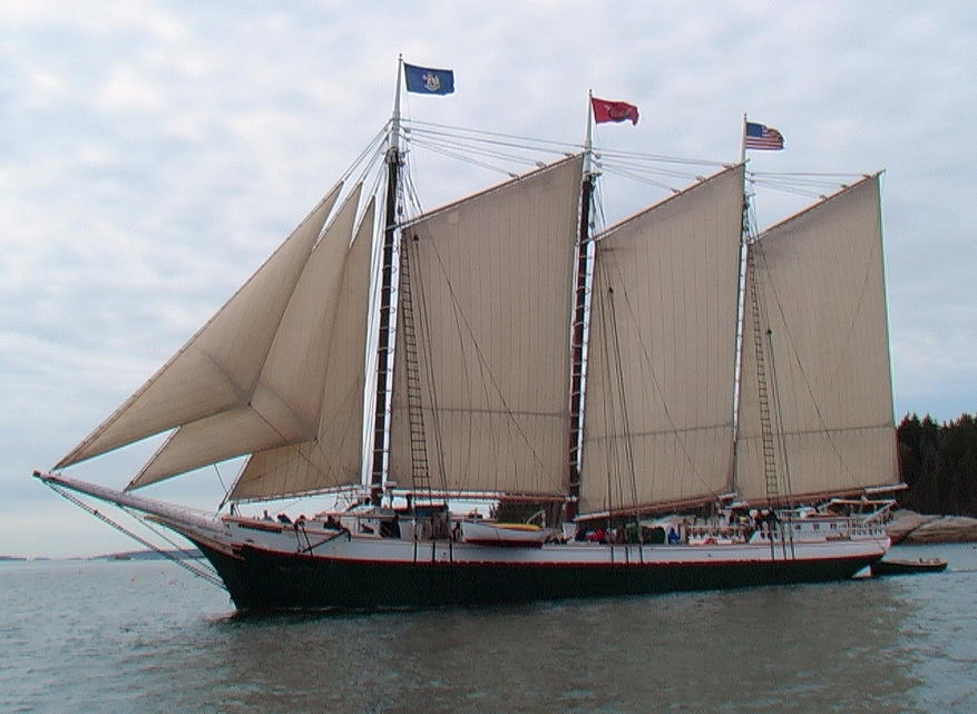 La goélette à trois mâts américaine Victory Chimes